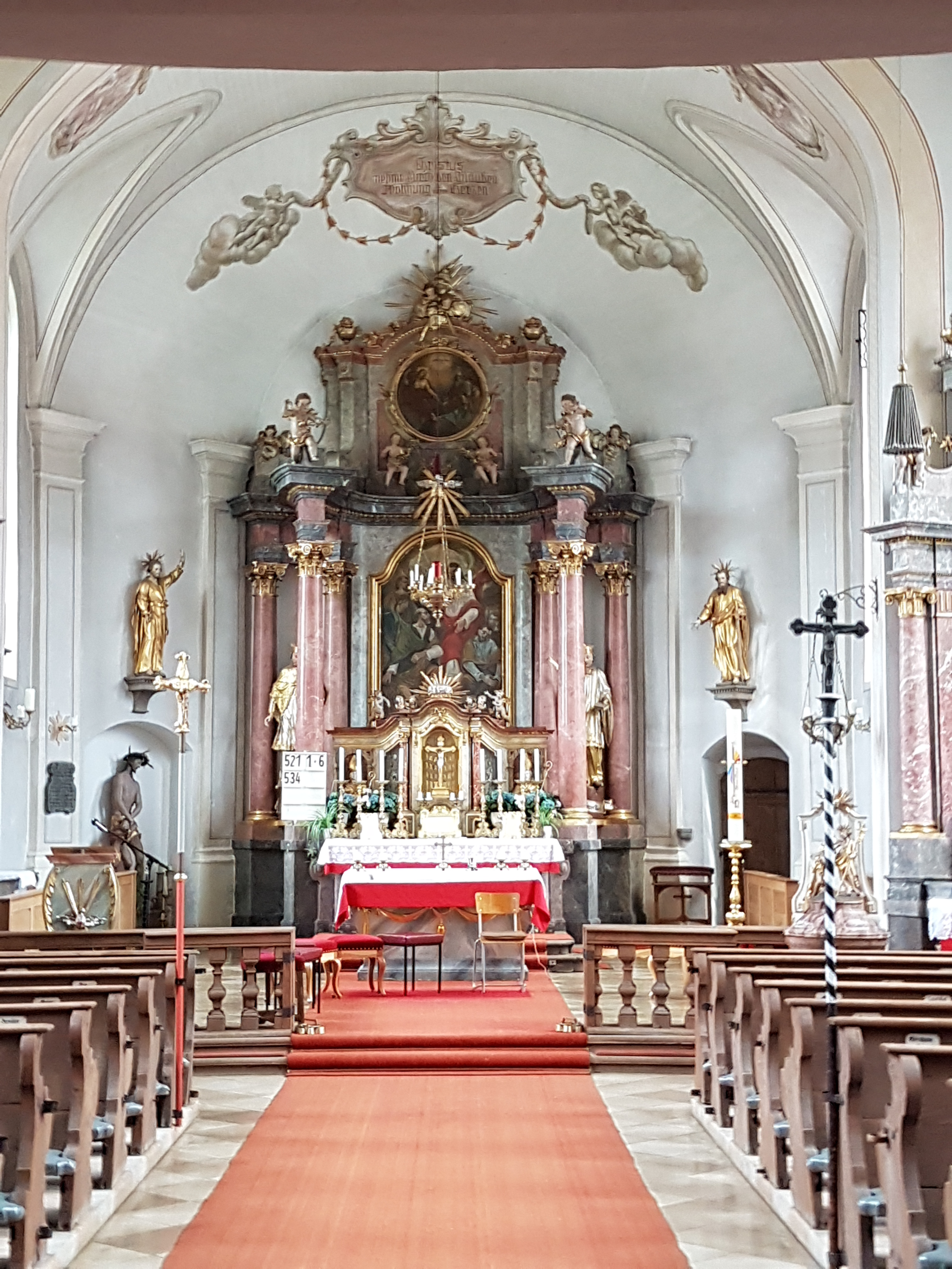 Thanning (Egling), Pfarrkirche St. Peter u. Paul, Neubau von 1786/87 unter Einbeziehung des spätromanischen Chorturms, Chor mit Hochaltar (nach 1780) und Deckenfresken von 1902.